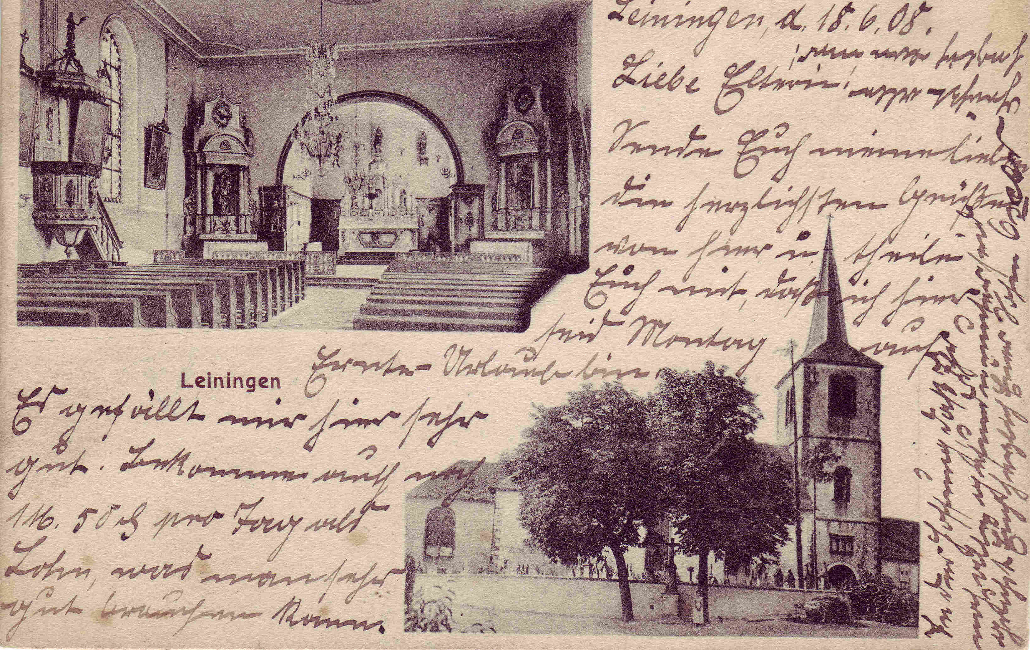 Carte postale de 1908 montrant l'église de Léning (Moselle/France) avant les travaux de transformation du clocher au début du XXe siècle